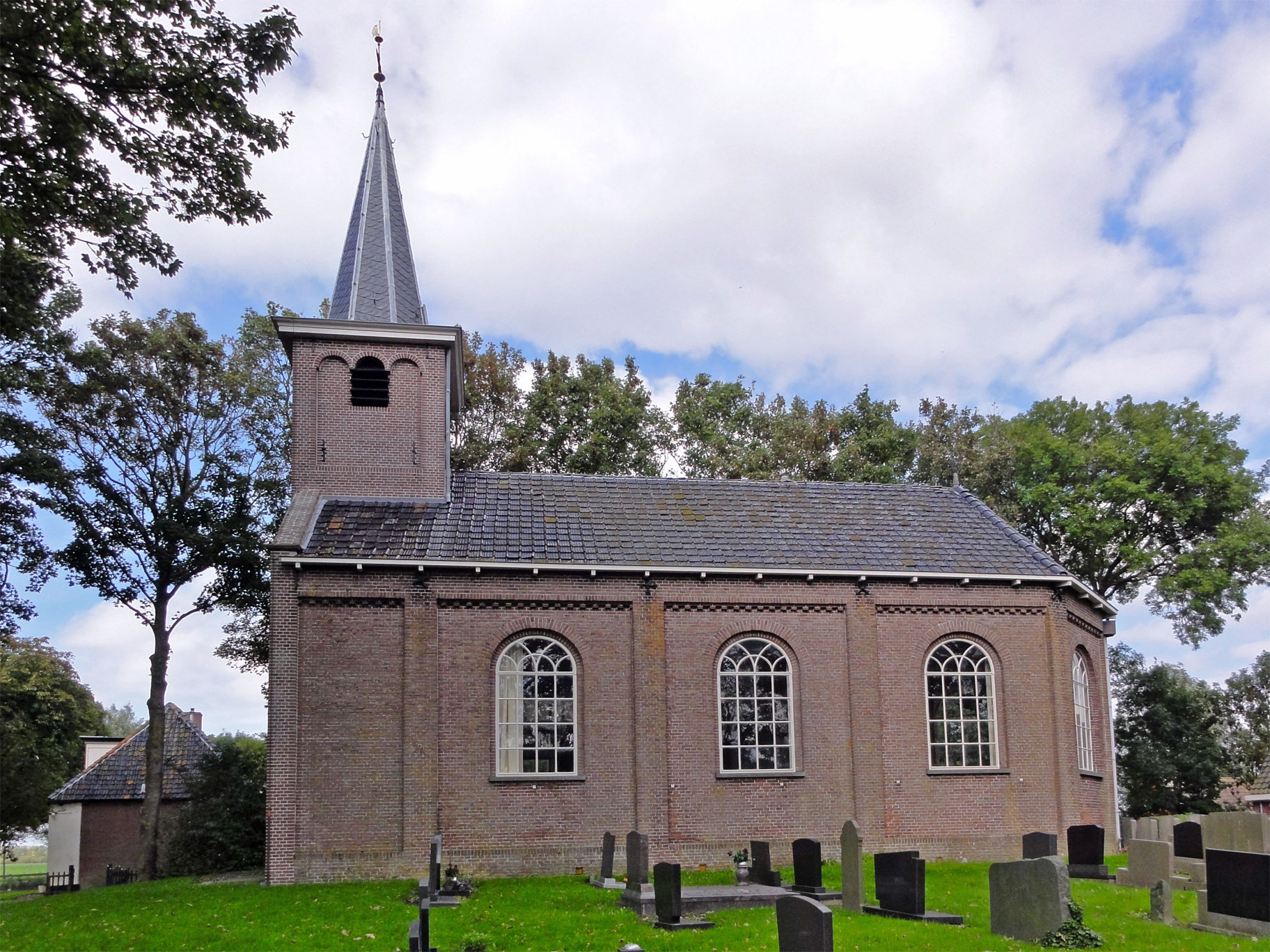 Kerk vanHiaure, met grafzerken als rijksmonument